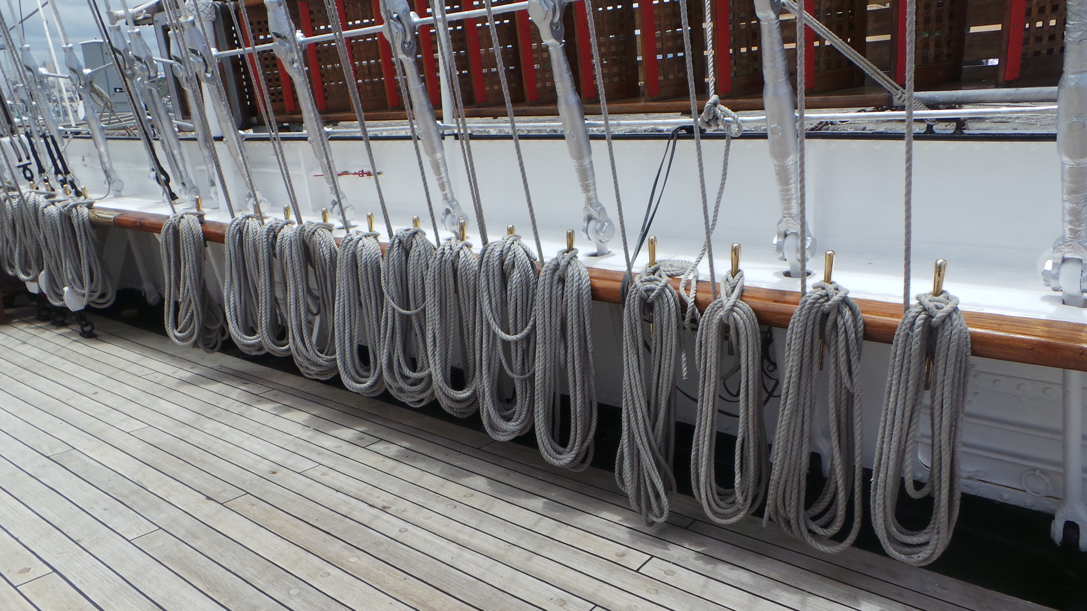 Visita al Buque Escuela NRP Sagres, en La Base Naval de Las Palmas de Gran Canaria. Este fin de semana de semana ( 20, 21 y 22 de junio de 2014) tenemos la oportunidad de disfrutar, en Las Palmas de Gran Canaria, de la visita del buque escuela portugués NRP Sagres, se encuentra atracado en el muelle de la base naval y podrá ser visitado hoy viernes hasta las 19h y mañana sábado de 10 a 12h y de 14 a 19h . El Buque proveniente de Lisboa partirá el domingo hasta Las Azores , para luego regresar a Lisboa, cuenta con unos 60 guardiamarines, con una decena de mujeres entre ellos, que realizan su periodo de instruccion Construido en 1937 en Hamburgo y tras varios avatares, fue adquirido en 1961 por la marina Portuguesa para sustituir al Sagres II, entrando en servicio como Sagres III en febrero de 1962. Tiene 89,5 metros de eslora, 12 de manga y 5,5 de calado, siendo su altura máxima de 45,5 metros. Cuenta además con 1.971 metros cuadrados de vela y desplaza 1.893 toneladas. La figura del mascarón de proa del Sagres III es el Infante D. Henrique nacido el 4 de marzo de 1394, siendo uno de los impulsores de la expansión y descubrimientos portugueses de la época. Más información del Buque : Web del Buque